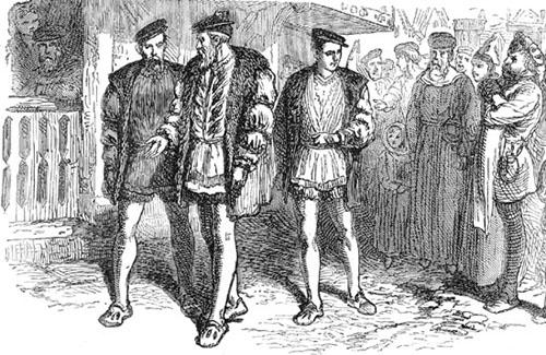 John Cabot in Londen. 19e eeuwse afbeelding Auteur: Percival Skelton. Verschenen in: Joseph Hatton & M. Harvey: Newfoundland, the Oldest British Colony (London: Chapman and Hall, 1883). Overgenomen van